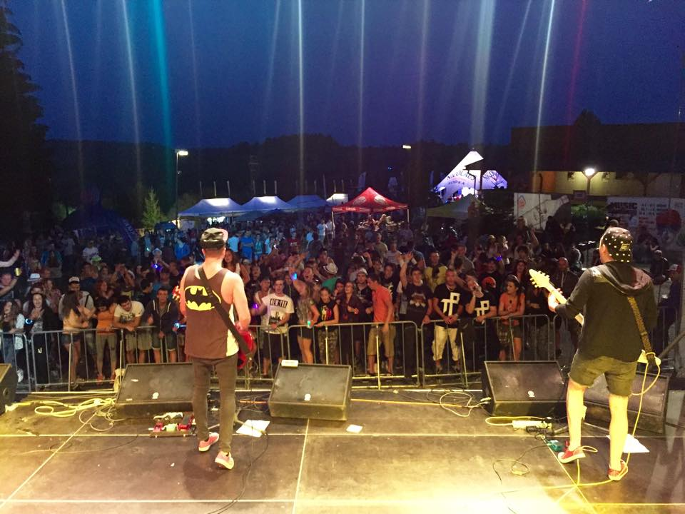 Koncert, live 2015